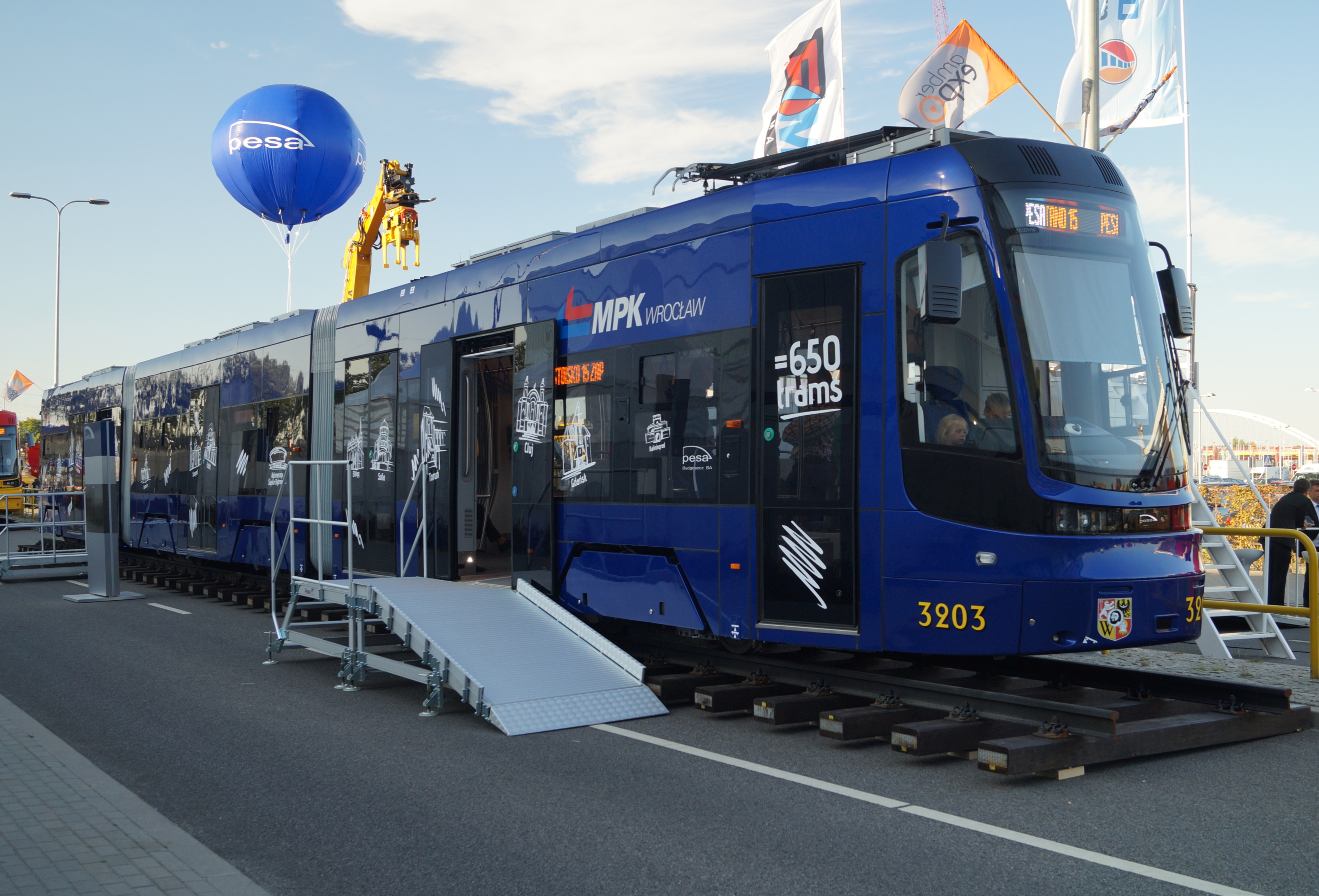 The making of this document was supported by Wikimedia Polska Association, within Wikigrant no. WG 2015-34. English | polski | +/− Tramwaj Pesa Twist 2010NW dla Wrocławia wystawianego na Targach Trako 2015